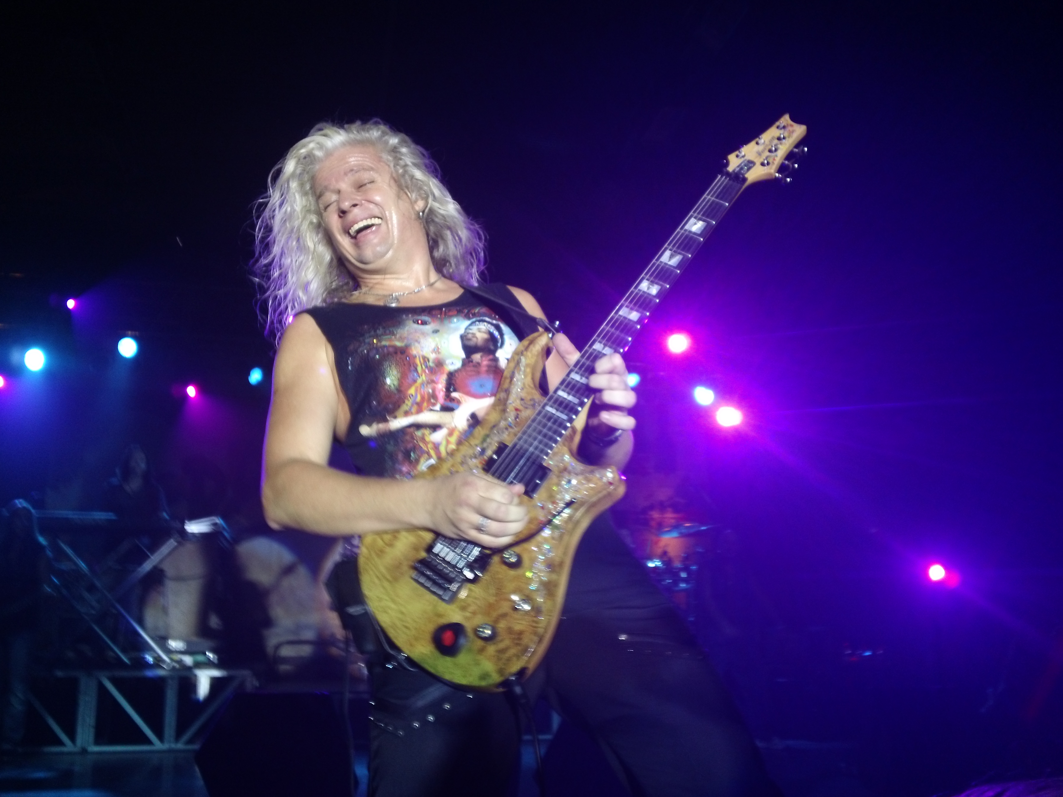 Alapi István az Edda Művek Nagykoncertjén a Körcsarnokban (Budapest, Ifjúság útja), 2011. október 29-én.